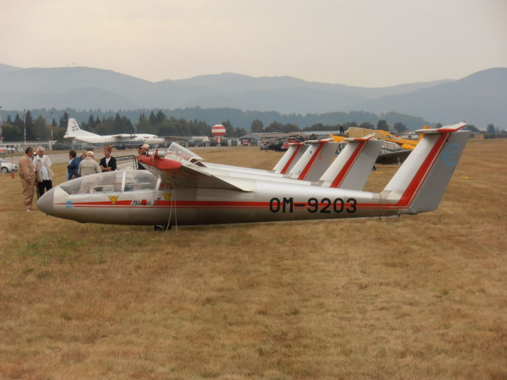 Očovskí bačovia s L-23 Super Blaník